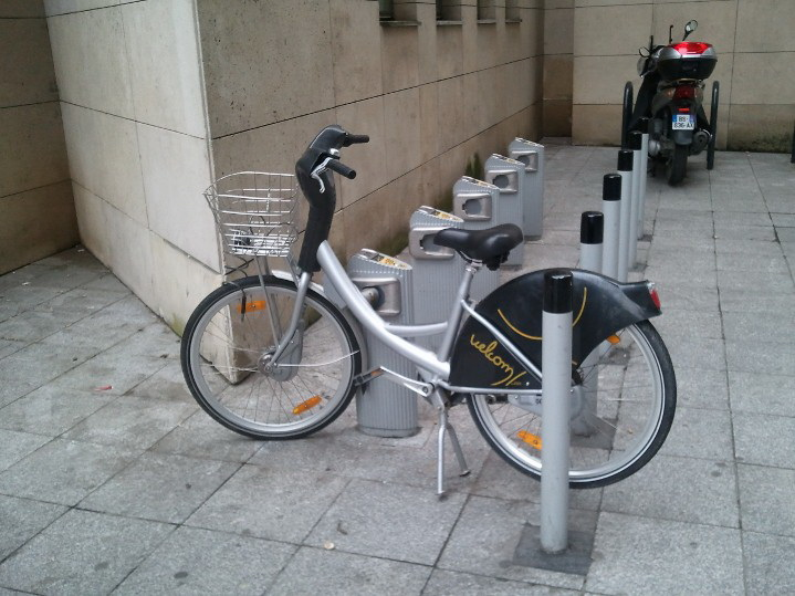 L'un des derniers velcoms en service, en mai 2012 devant l'Hôtel de Ville de Saint-Denis.Remarquer les barres verticales, destinées à empêcher l'arrachement et le vol des vélos.